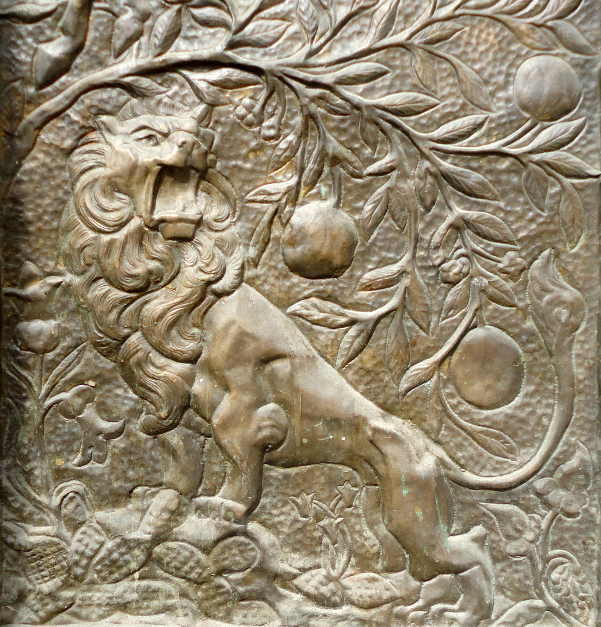 בית החולים ביקור חולים הוא בית חולים שנוסד באמצע המאה ה-19 בעיר העתיקה בירושלים, ועבר בשנת 1925 למושבו ברחוב הנביאים פינת רחוב שטראוס, שם הוא שוכן ופועל היום.